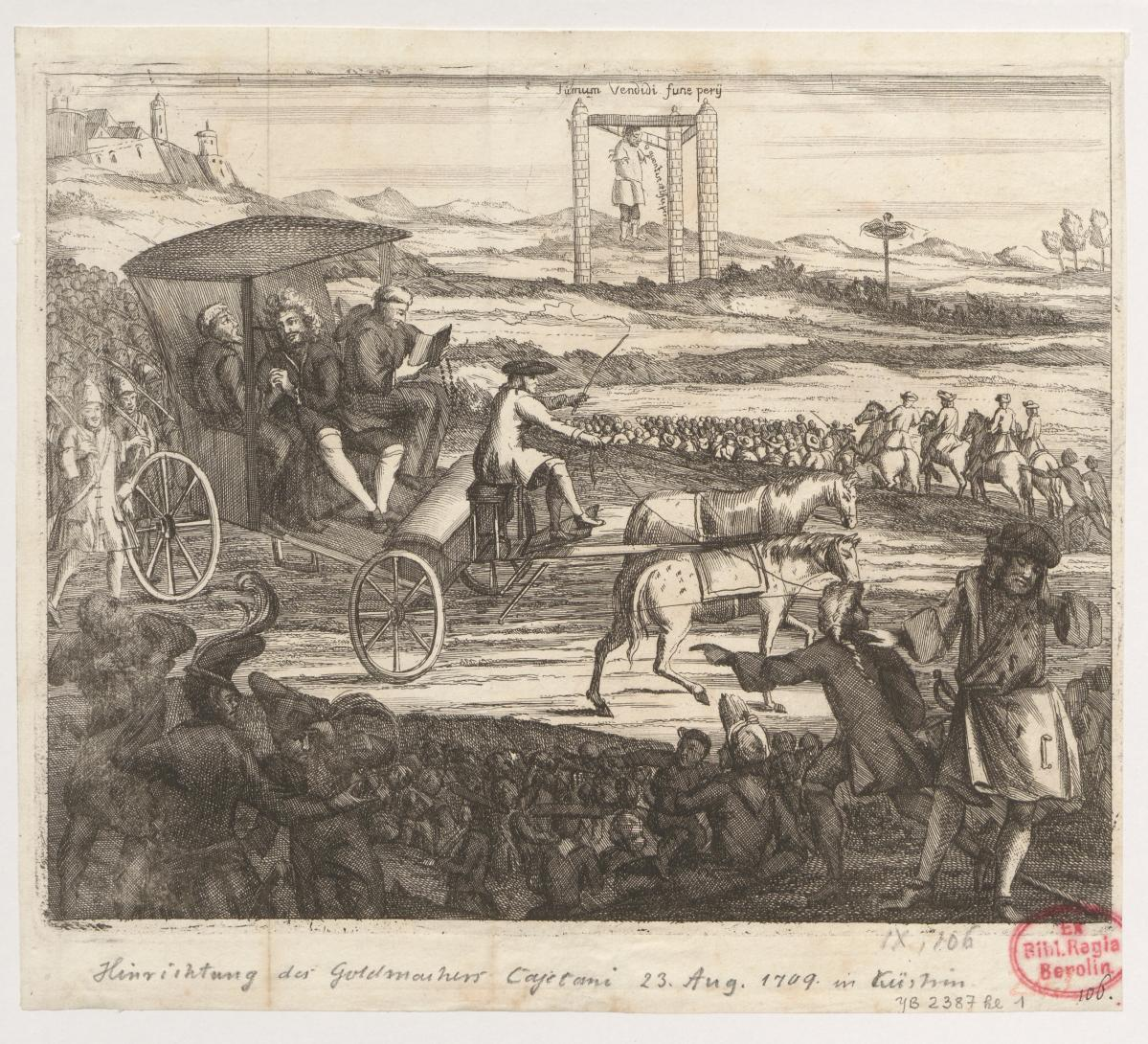 Hinrichtung des Goldmachers Cajetani 23. August. 1709 in Küstrin